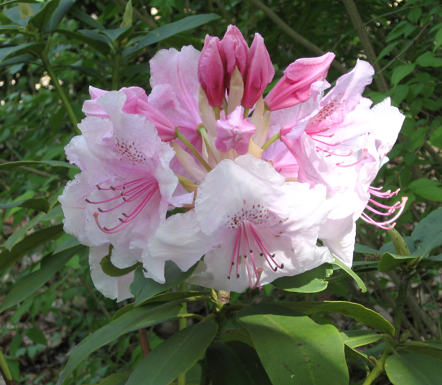 Rhododendron 'Pink Pearl'. Real Jardín Botánico de Madrid.